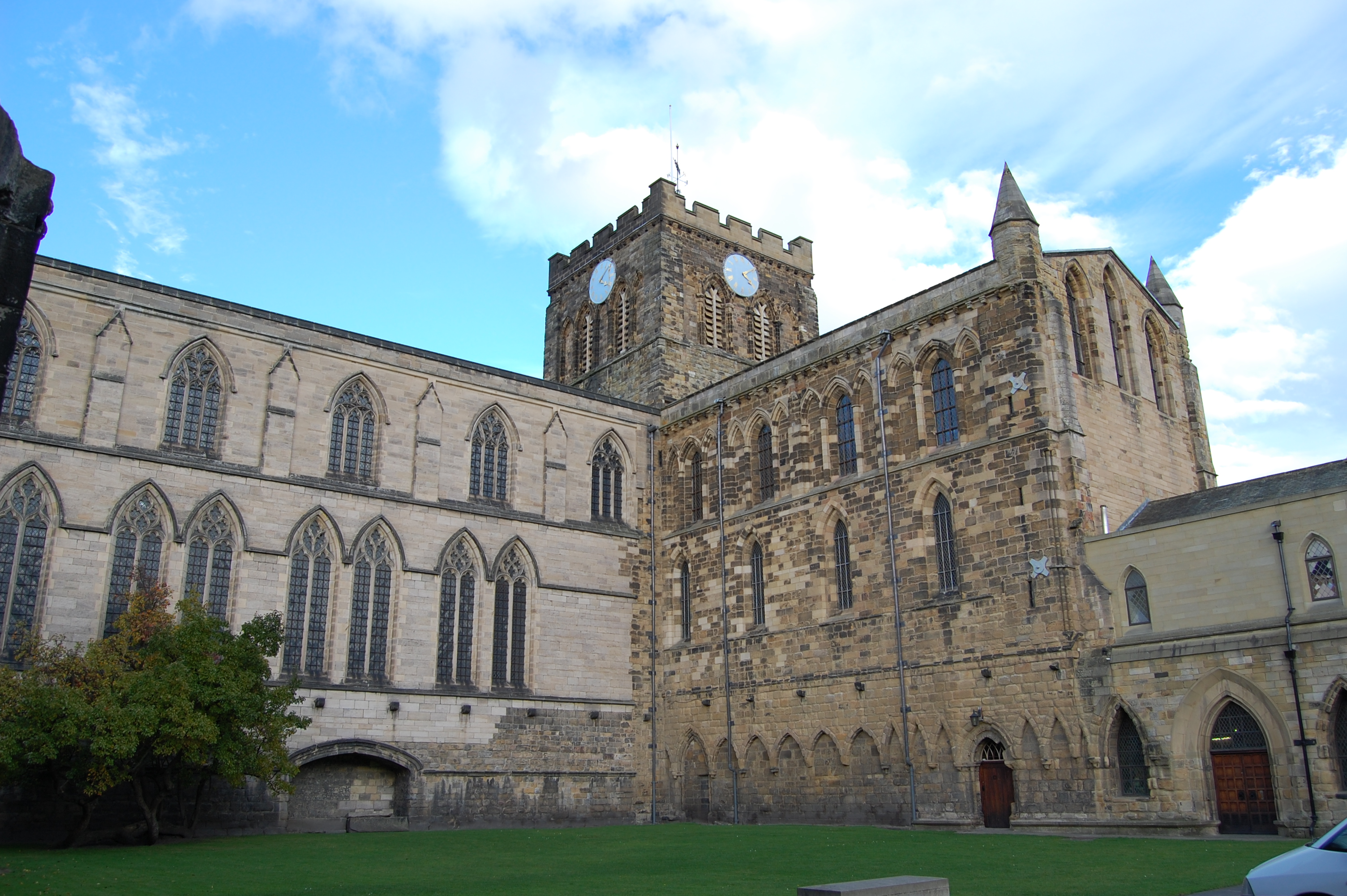 Hexham abbey